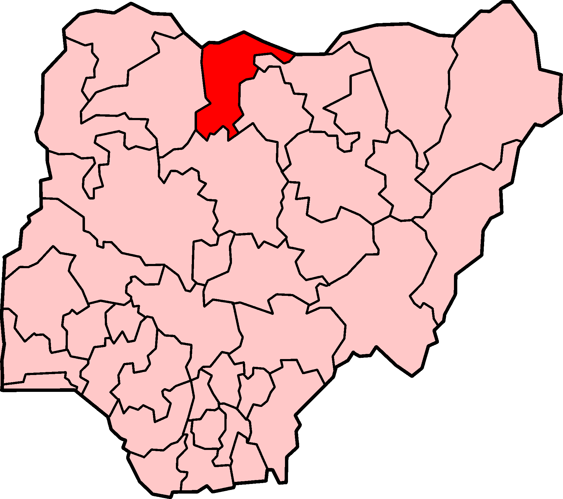 Localização do